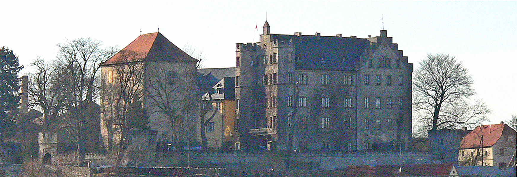 Schloss Thüngen, Bayern, Unterfranken; Ostansicht